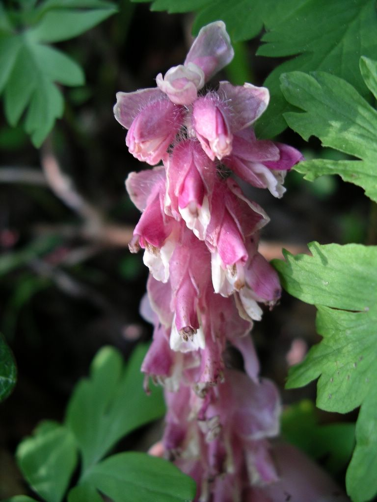 Schuppenwurz (Lathraea squamaria) Fotografiert in Wels, Oberösterreich (AT)